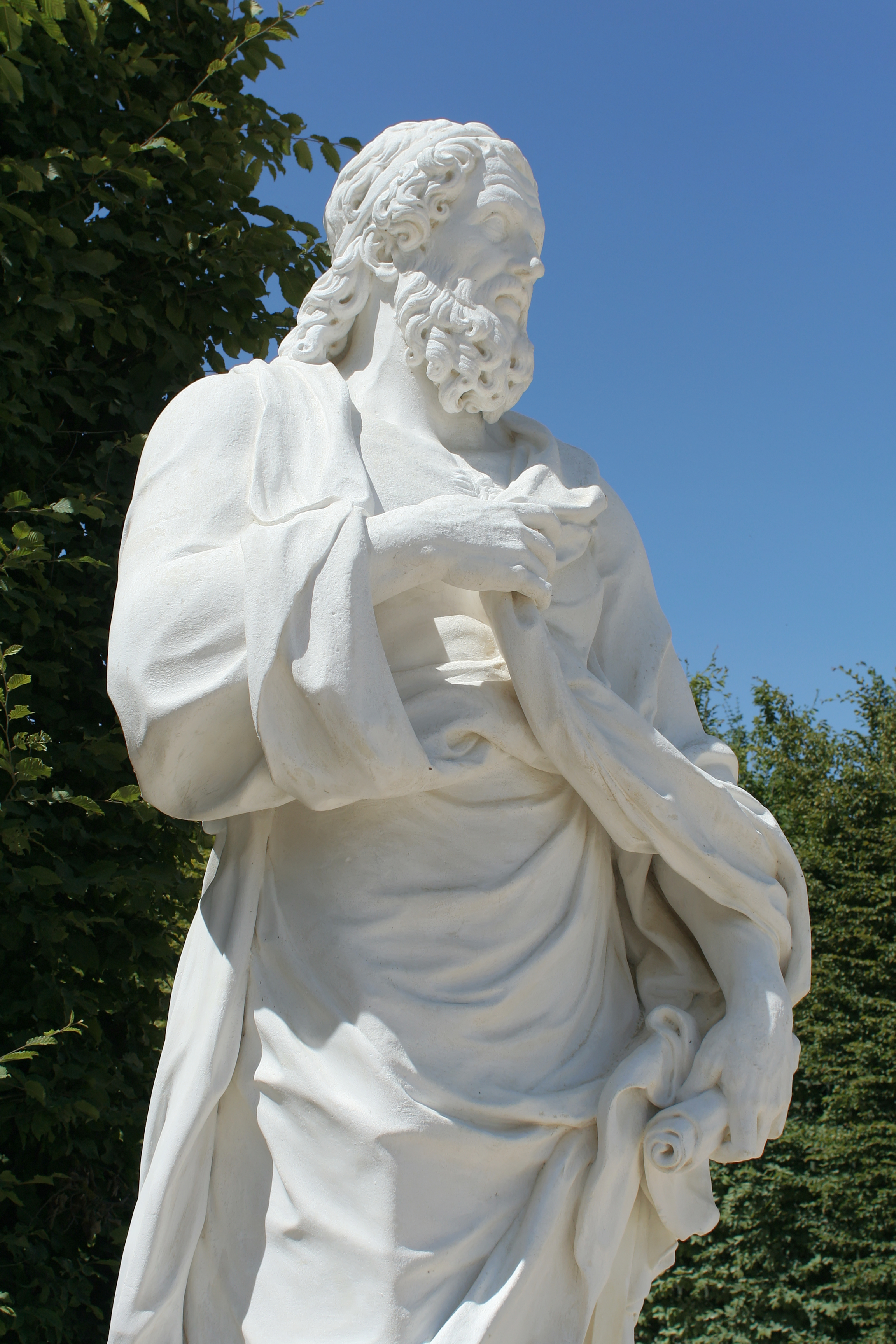 Parc de Versailles, Rond-Point des Philosophes. Isocrate, Pierre Granier (1684-1688) MR1870